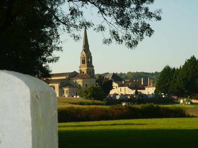 l'église